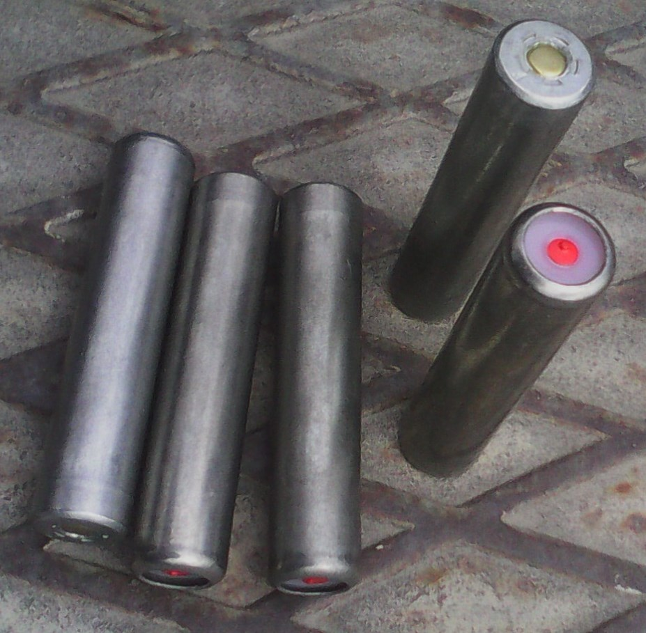 БАМы (боеприпасы-ампулы) для УДАРа (устройство дозированного распыления аэрозоля) с CR (дибензоксазепин). Вид сбоку, донца и дульной части